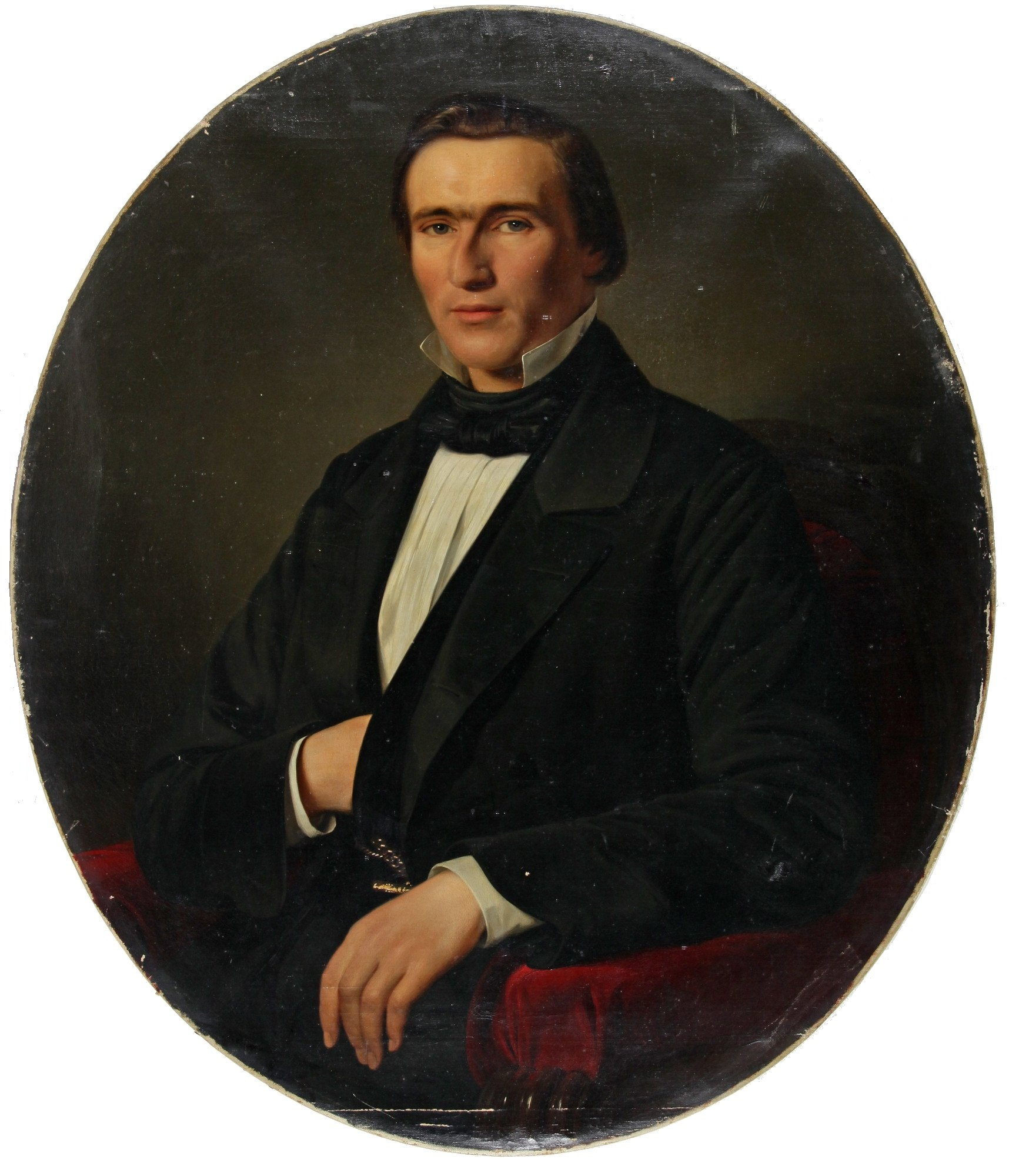 Das porträtierte Paar gehörte zu den aufstrebenden Kaufmannsfamilien Bremens in der zweiten Hälfte des 19. Jahrhunderts. Oltmann Thyen (1821 Apen/Oldenburg - 1891 Bremen) gründete 1851 die Schiffsreederei "O.Thyen" und heiratete im selben Jahr Maria S. R. Wilkens (1829 - 1867 Bremen), Tochter des Bremer Kaufmanns Georg Wilkens.[1] ↑ Reiss & Sohn